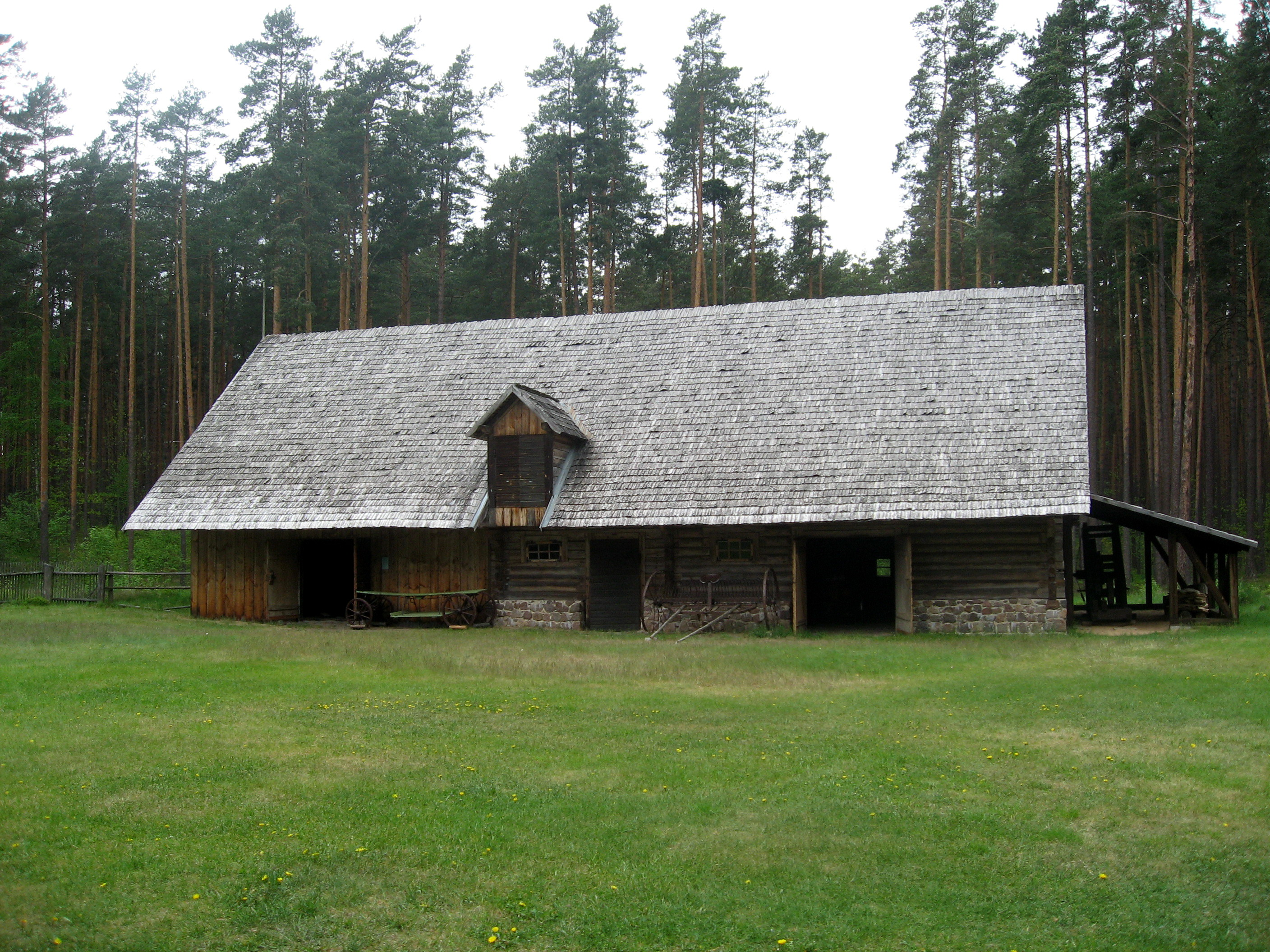 Lotyšské etnografické muzeum v přírodě: Chlév a vozík, oblast Vidzeme, Lubāna, "Laimiņi", postaven roku 1924